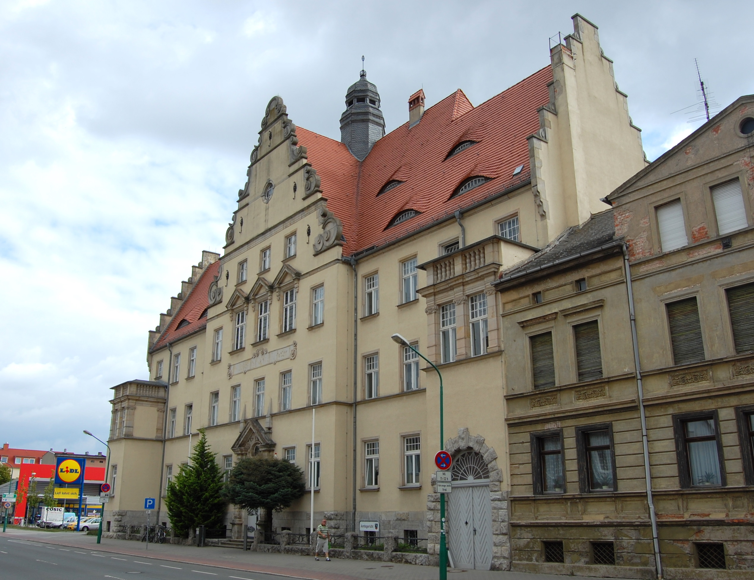 Amtsgericht Schönebeck, Westseite